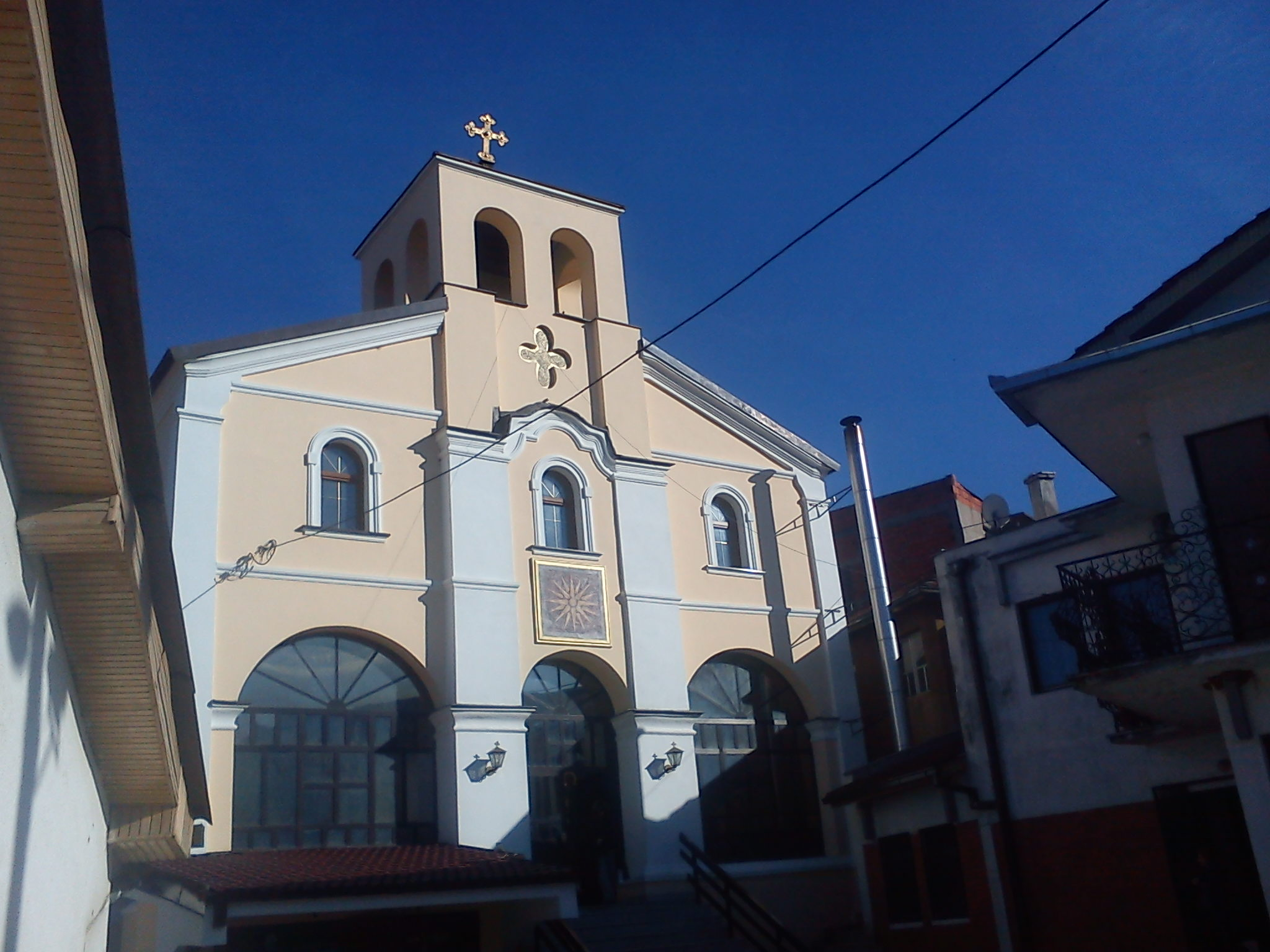 Црквата Света Богородица во Велес